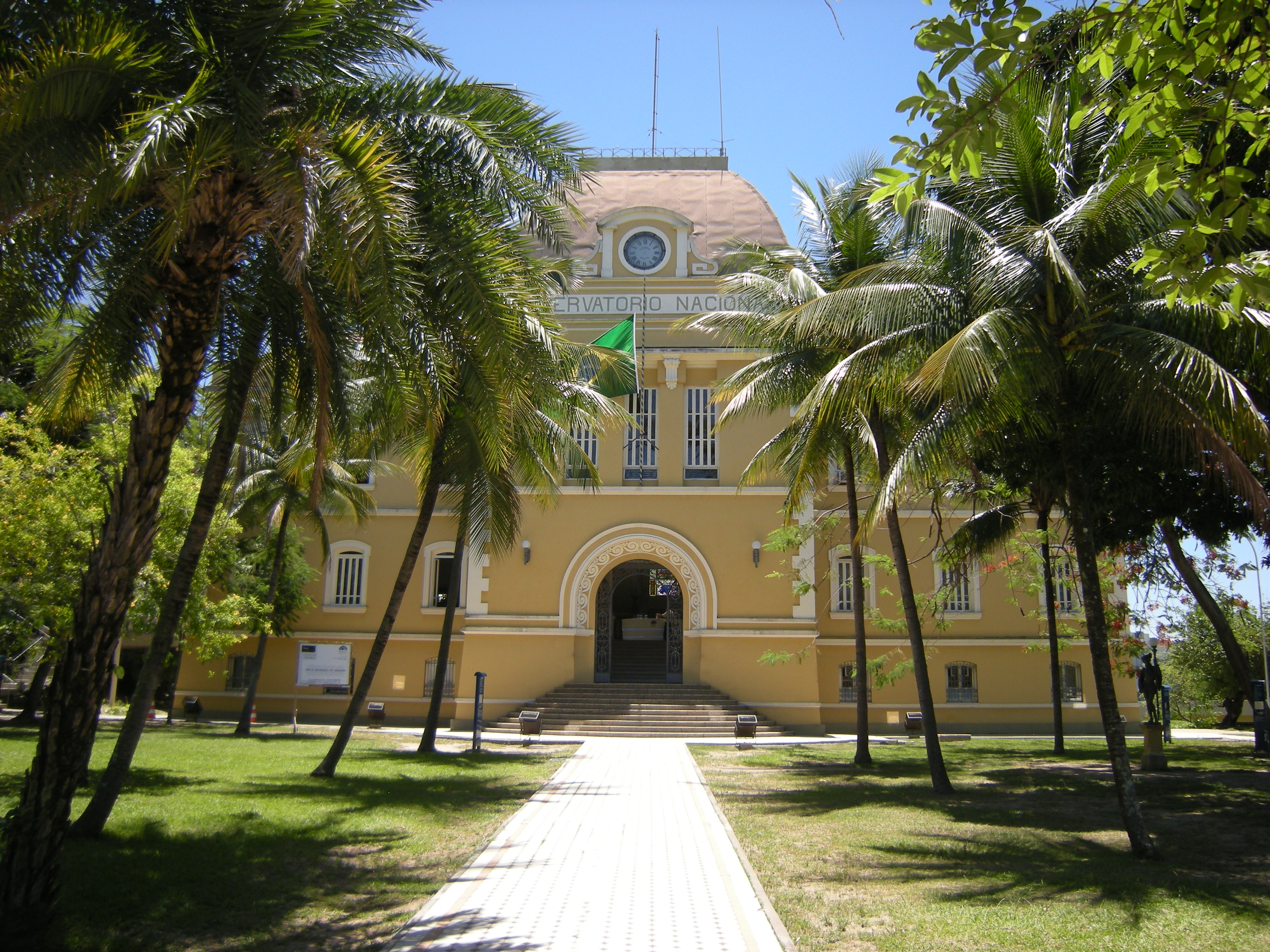 Museu de Astronomia e Ciências Afins - Rio de Janeiro.